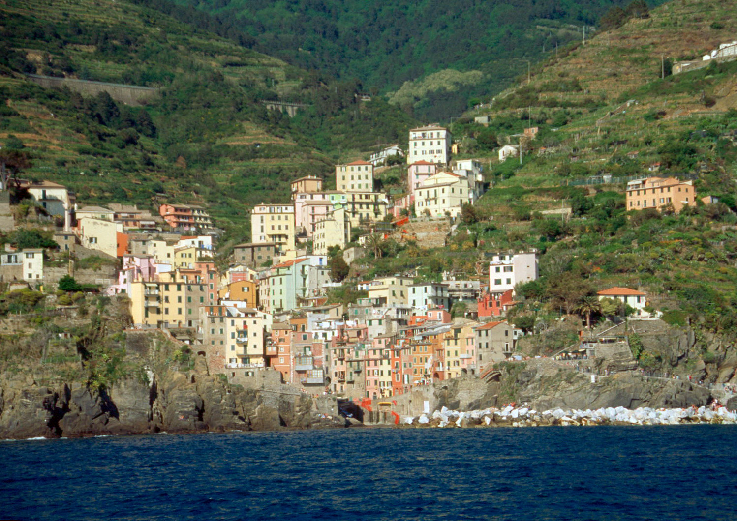 Riomaggiore 2004